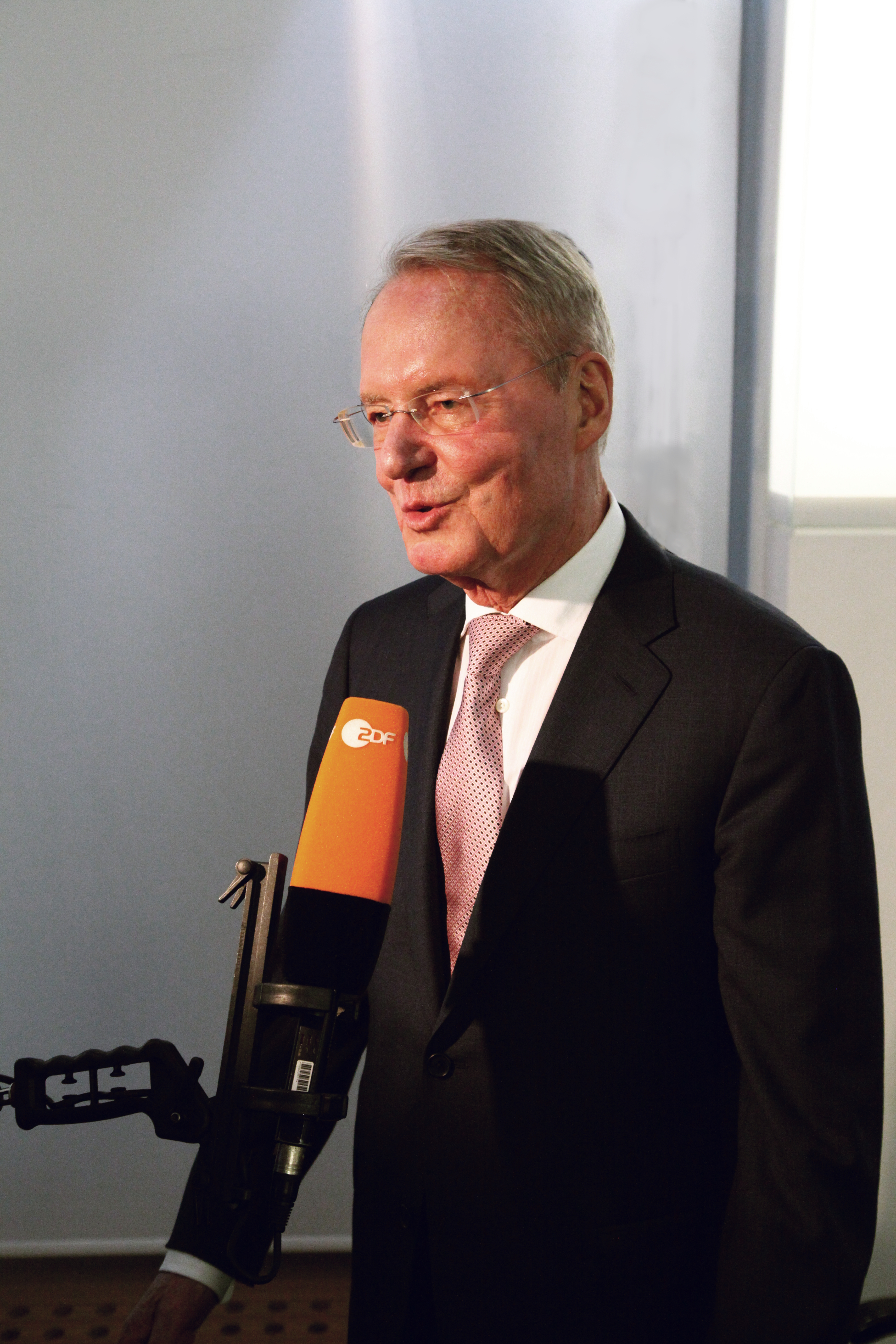 Hans-Olaf Henkel in der Bundespressekonferenz am 14 Jan. 2014